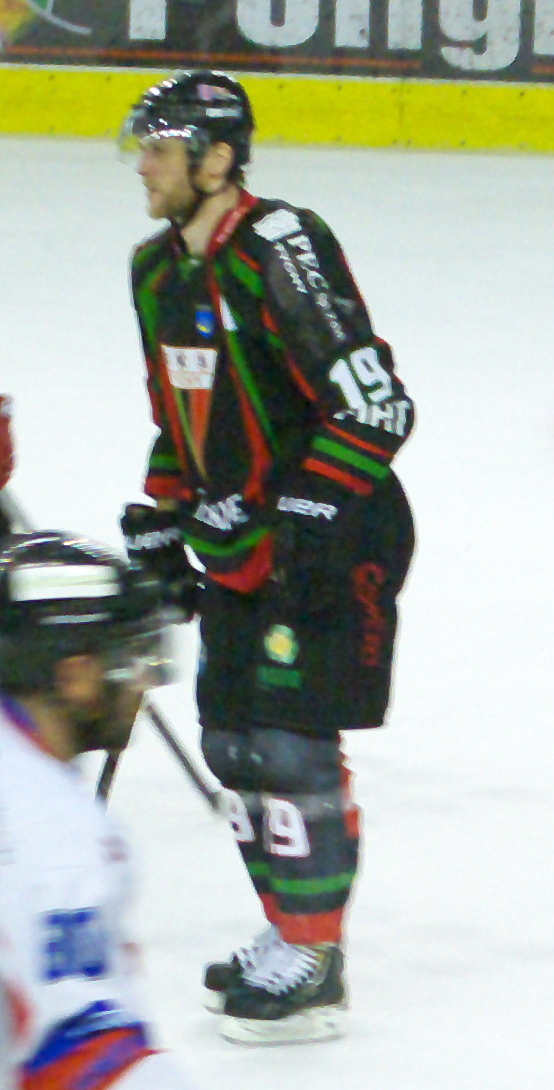 Szósty mecz finałowy o mistrzostwo Polski w hokeju na lodzie w sezonie PHL 2013/2014: Ciarko PBS Bank KH Sanok – GKS Tychy (2:0), 3 kwietnia 2014 w Sanoku (Arena Sanok). Adrian Parzyszek